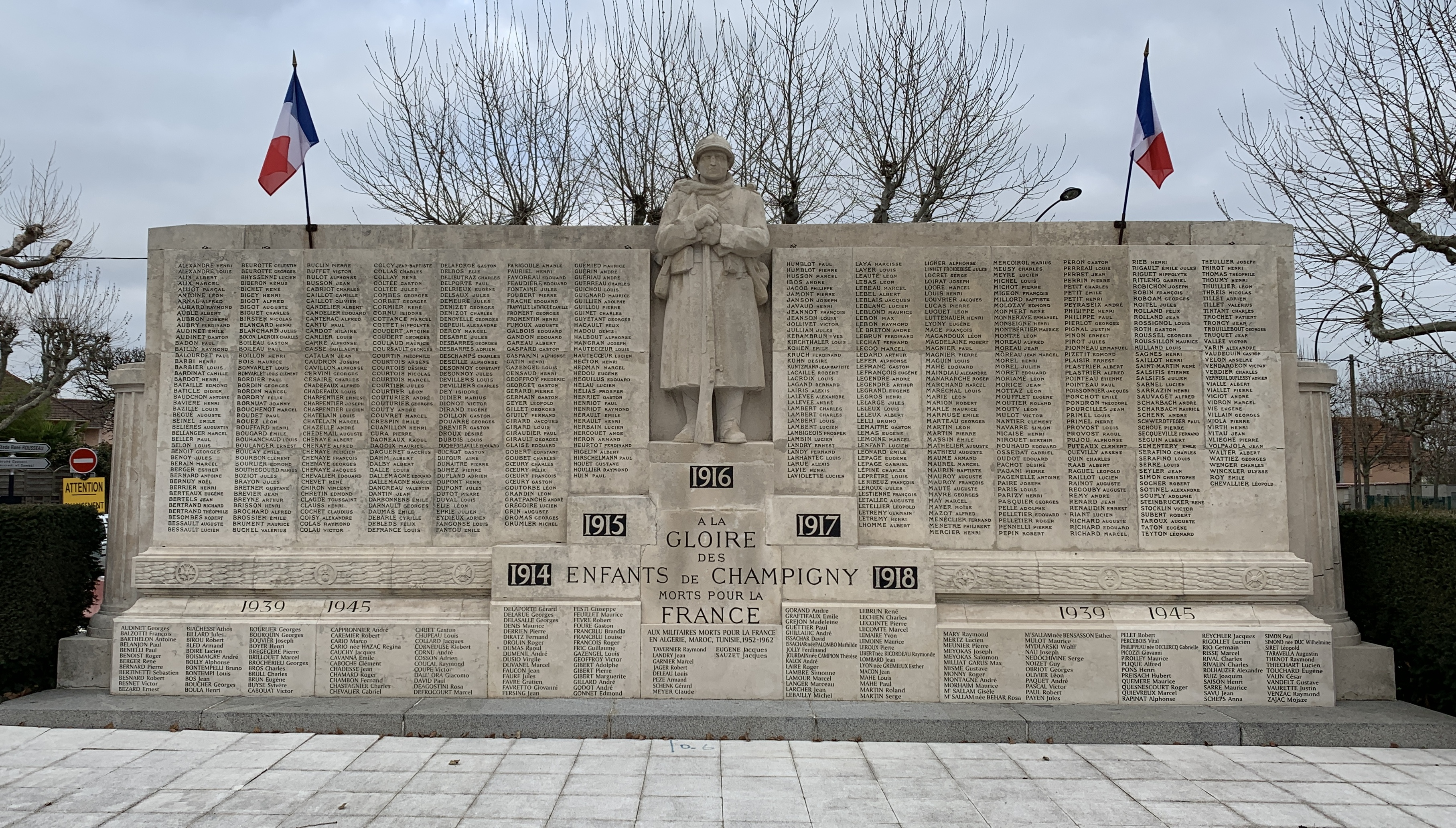 Monument aux morts de Champigny-sur-Marne.